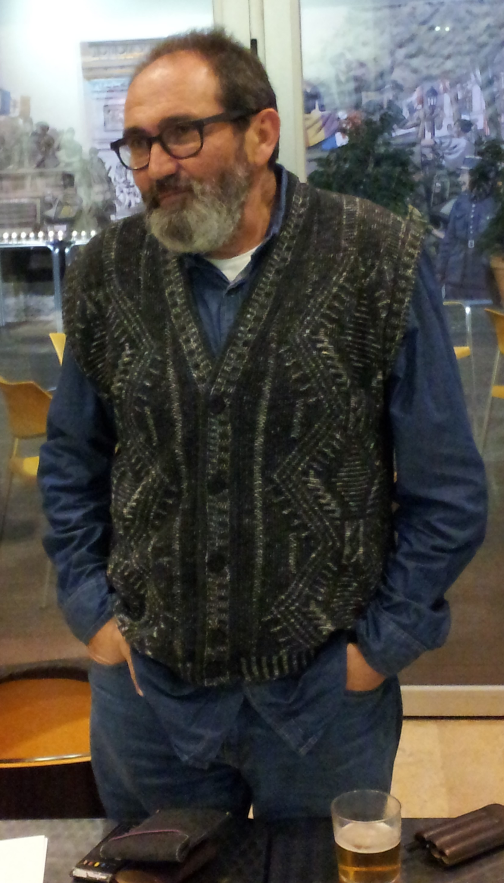 Sento.